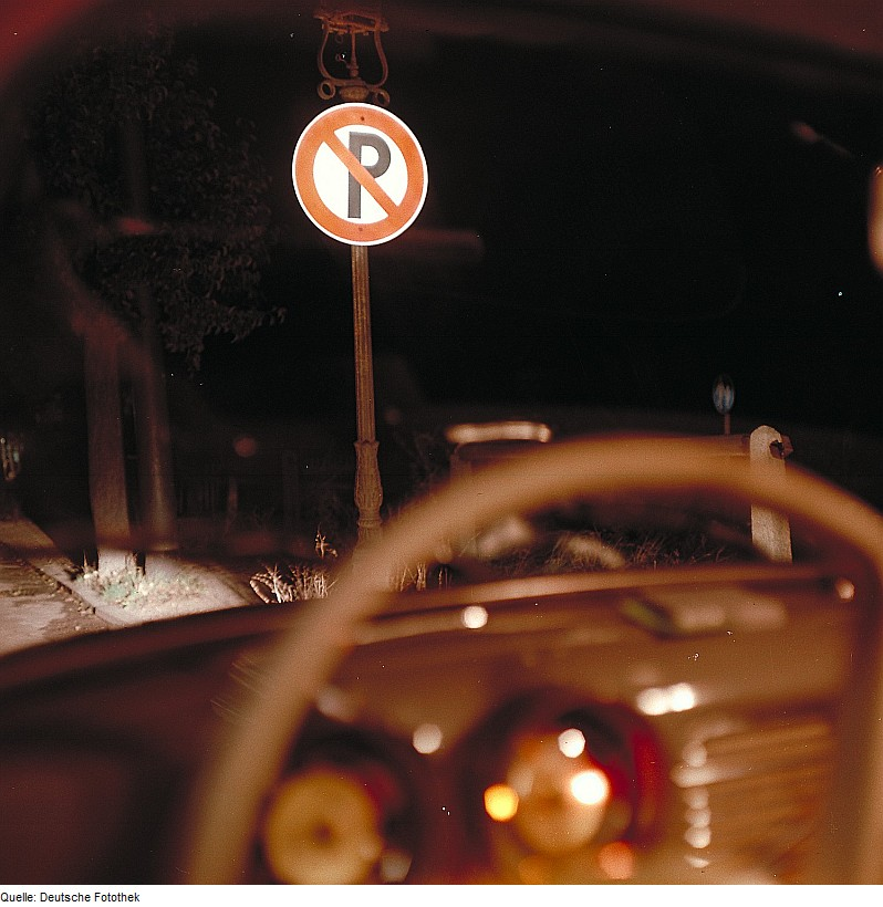 Original image description from the Deutsche FotothekVerkehrsschilder